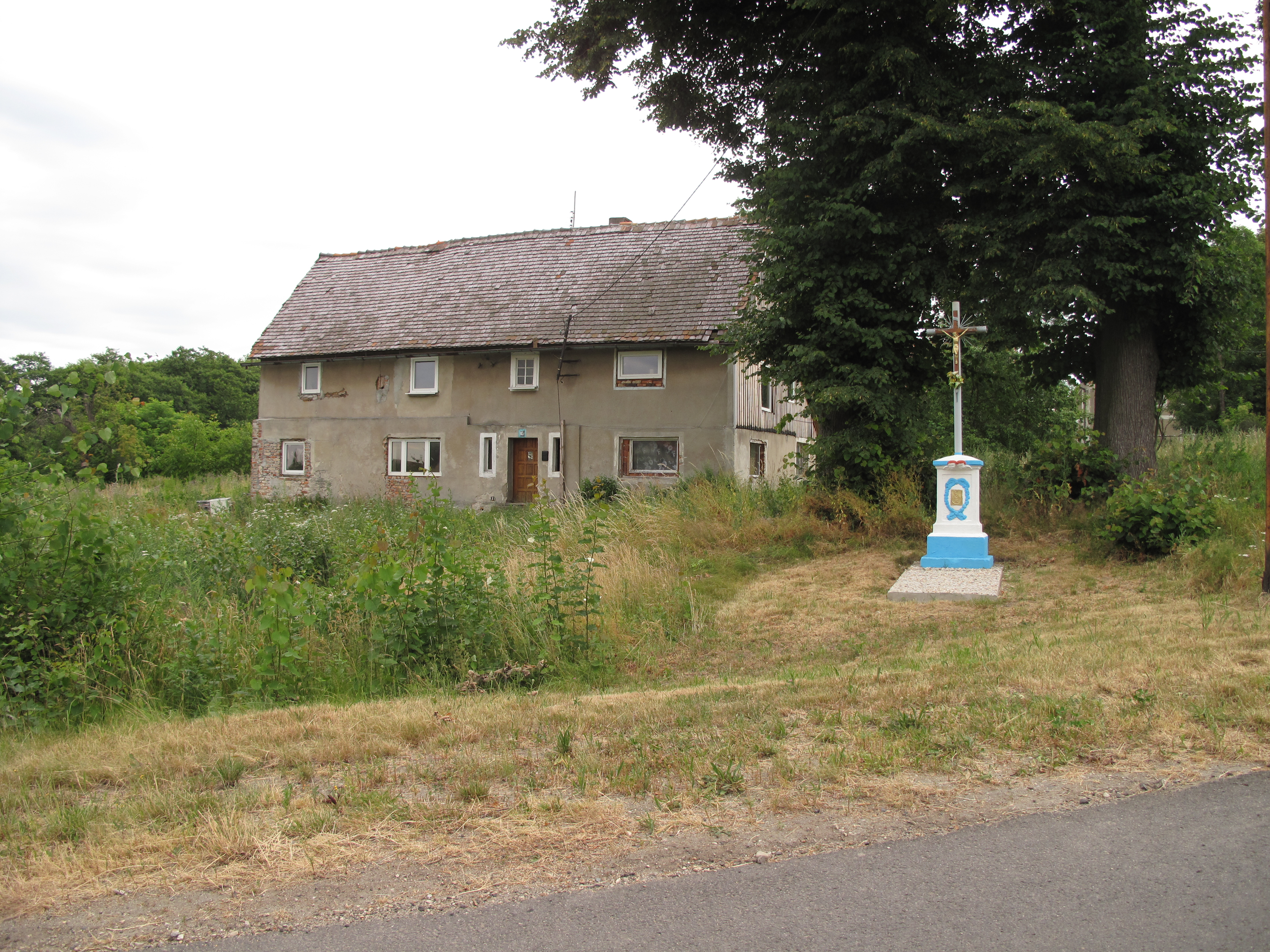 Bratków (województwo dolnośląskie). Polska